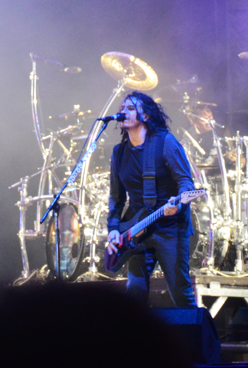 Korn treedt op tijdens Sziget, Boedapest.